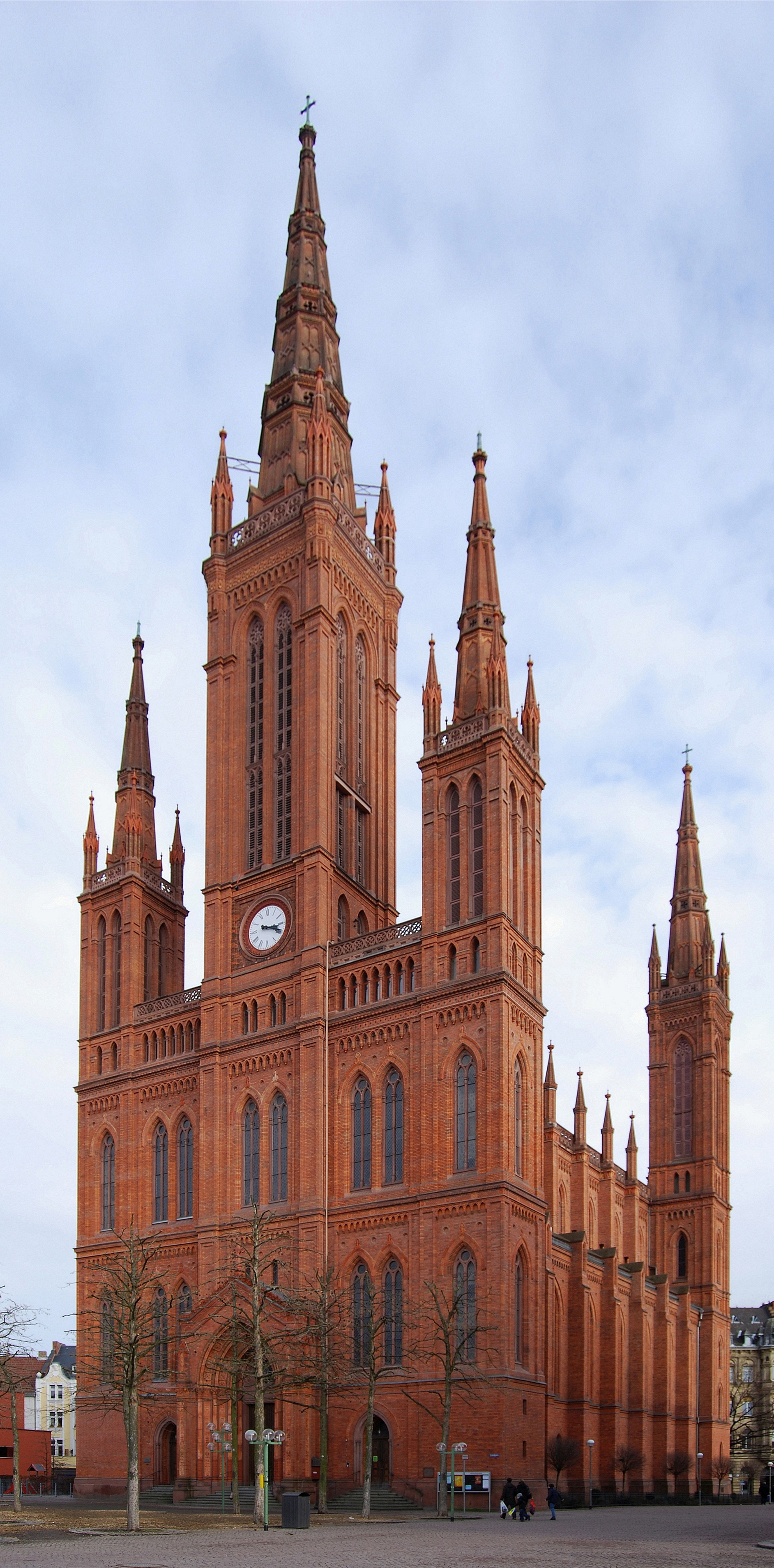 Die Marktkirche 2010